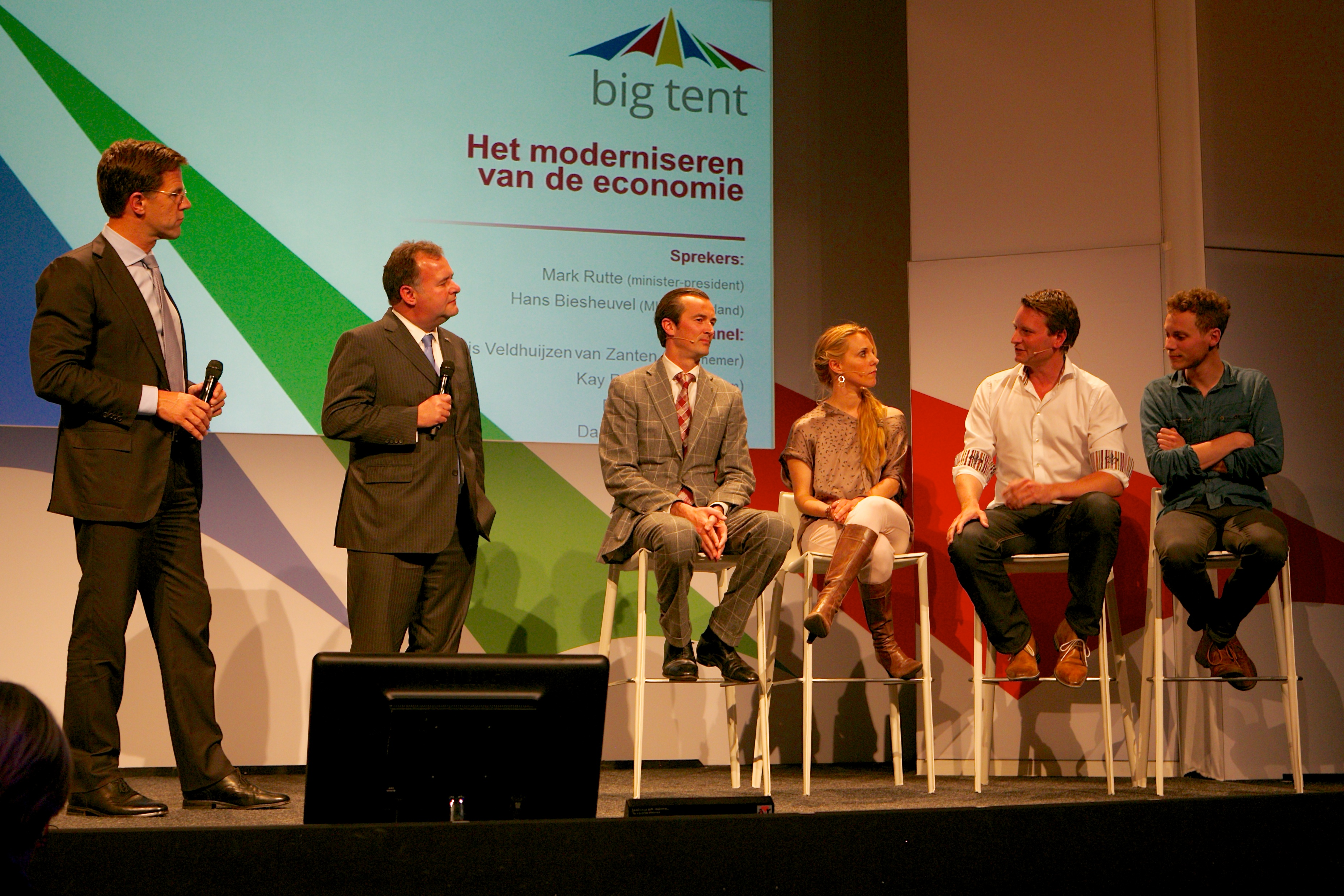 Minister-president Rutte spreekt tijdens het Google Big Tent Event in Amsterdam, gezamenlijk met MKB-voorzitter Biesheuvel, verschillende ondernemers over de rol van internet als motor voor economisch herstel. Google organiseert Big Tent Events over de hele wereld om de impact van internet op de samenleving te bespreken. Ondernemers en wetenschappers gaan in op de vraag welke rol internet kan spelen bij het aanjagen van export, het versterken van de Nederlandse innovatiekracht en vergroten van de arbeidsproductiviteit. Nederland behoort tot de koplopers in de interneteconomie. In de ICT-wereldranglijst van het World Economic Forum staat Nederland op de vierde plaats. Eenderde van het Europese internetverkeer met de Verenigde Staten loopt via Amsterdam. Hiermee is Nederland de digitale poort van Europa. De ambitie van het kabinet is om deze sterke uitgangspositie vast te houden en verder te verbeteren. Het kabinet stimuleert daarom de ontwikkeling van ICT-producten in topsectoren en voert tien projecten uit die gericht zijn op vergroten van de toepassing van ICT door bedrijven, in onderwijs en in de zorg. Foto: Photonic / Ernst van Deursen